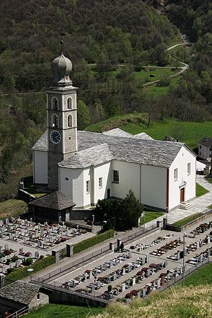 Chiesa SS. Pietro e Paolo